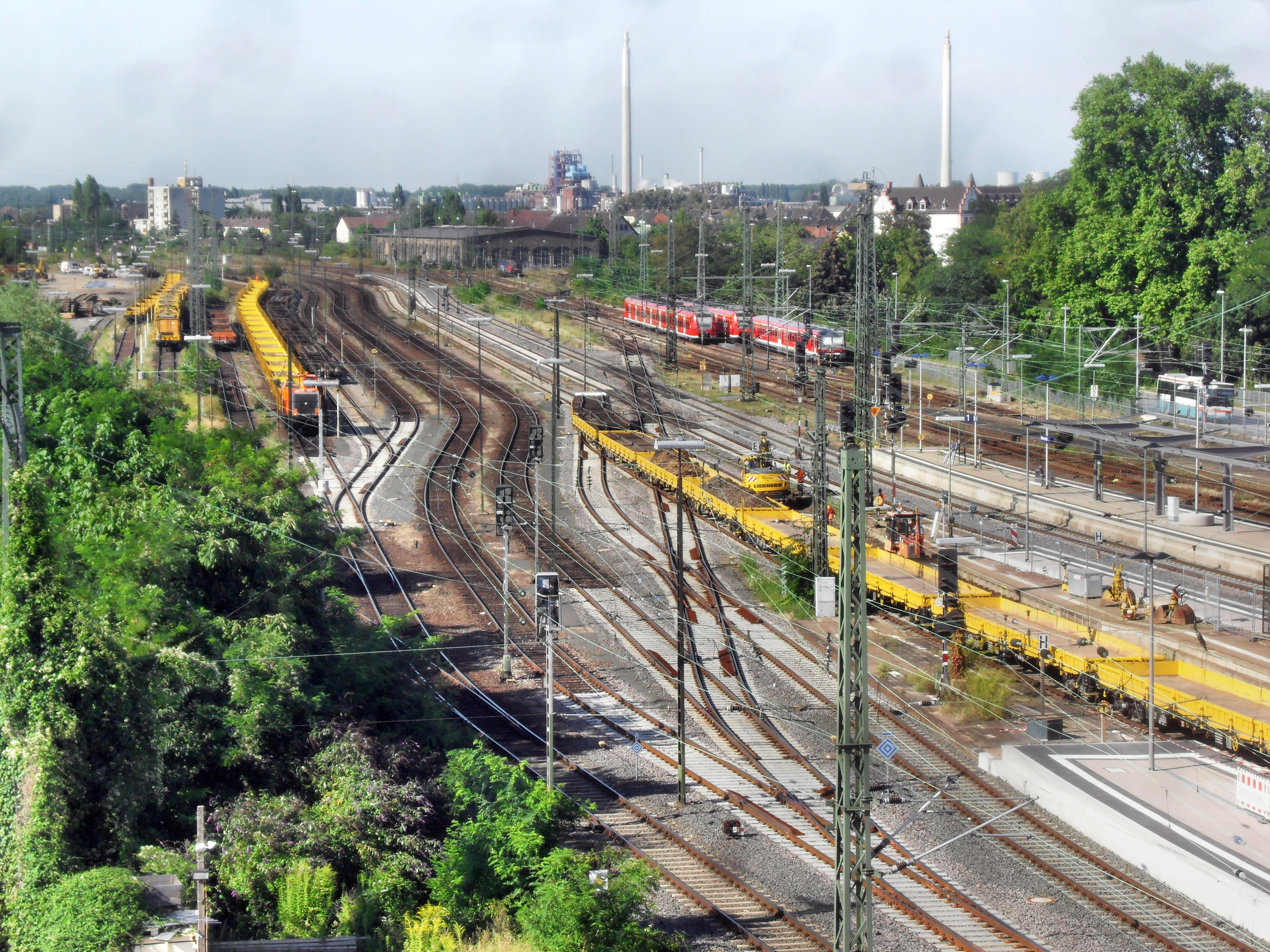 Das nördliche Gleisvorfeld des Wormser Hauptbahnhofes